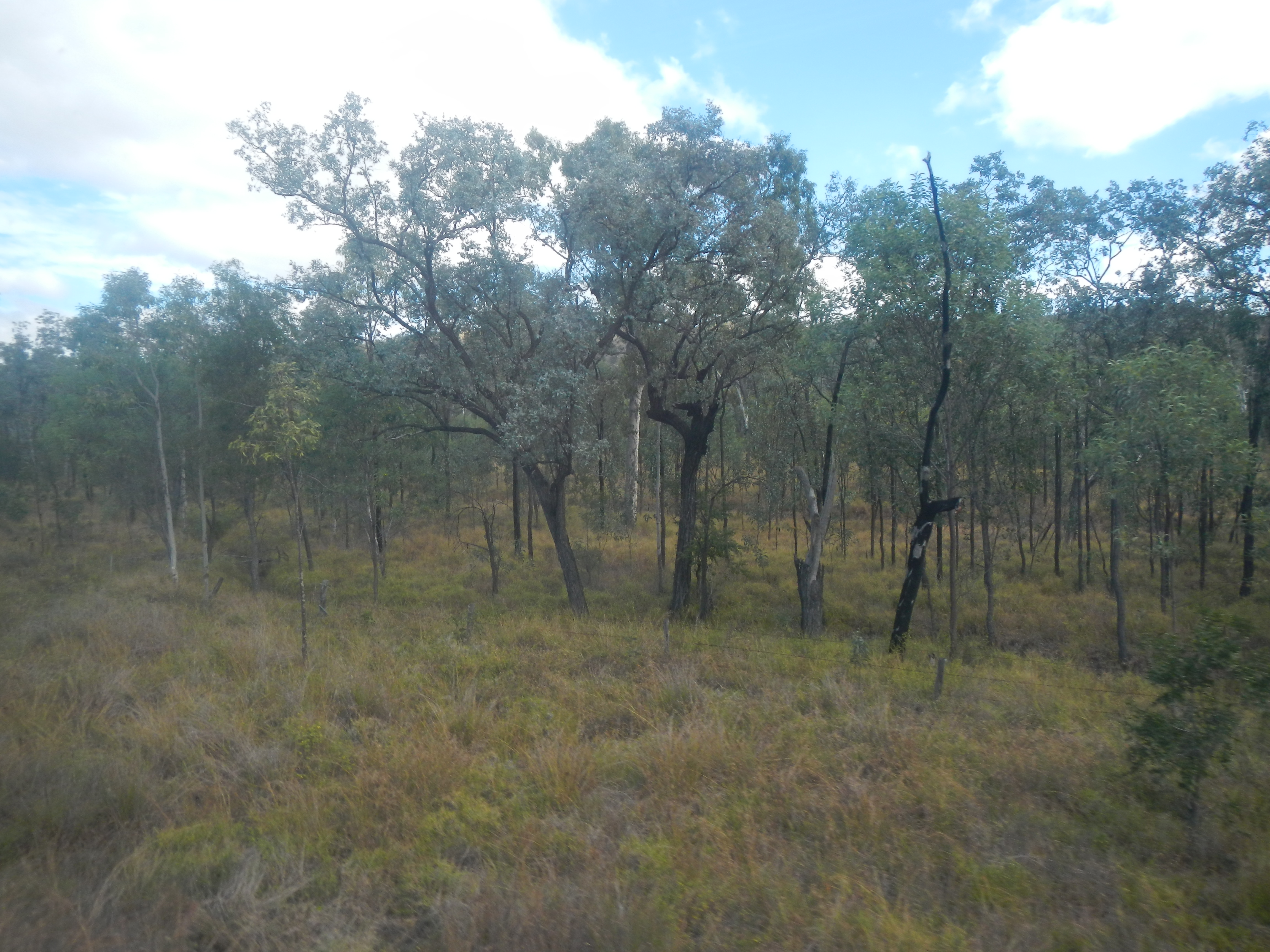 Drummond Ranges